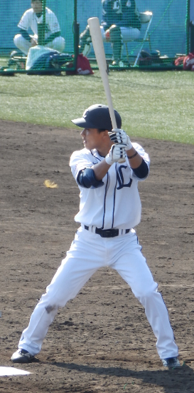 プロ初の阪神との練習試合。投手秋山拓巳・捕手今成亮太（2013.2.11 高知県春野球場）